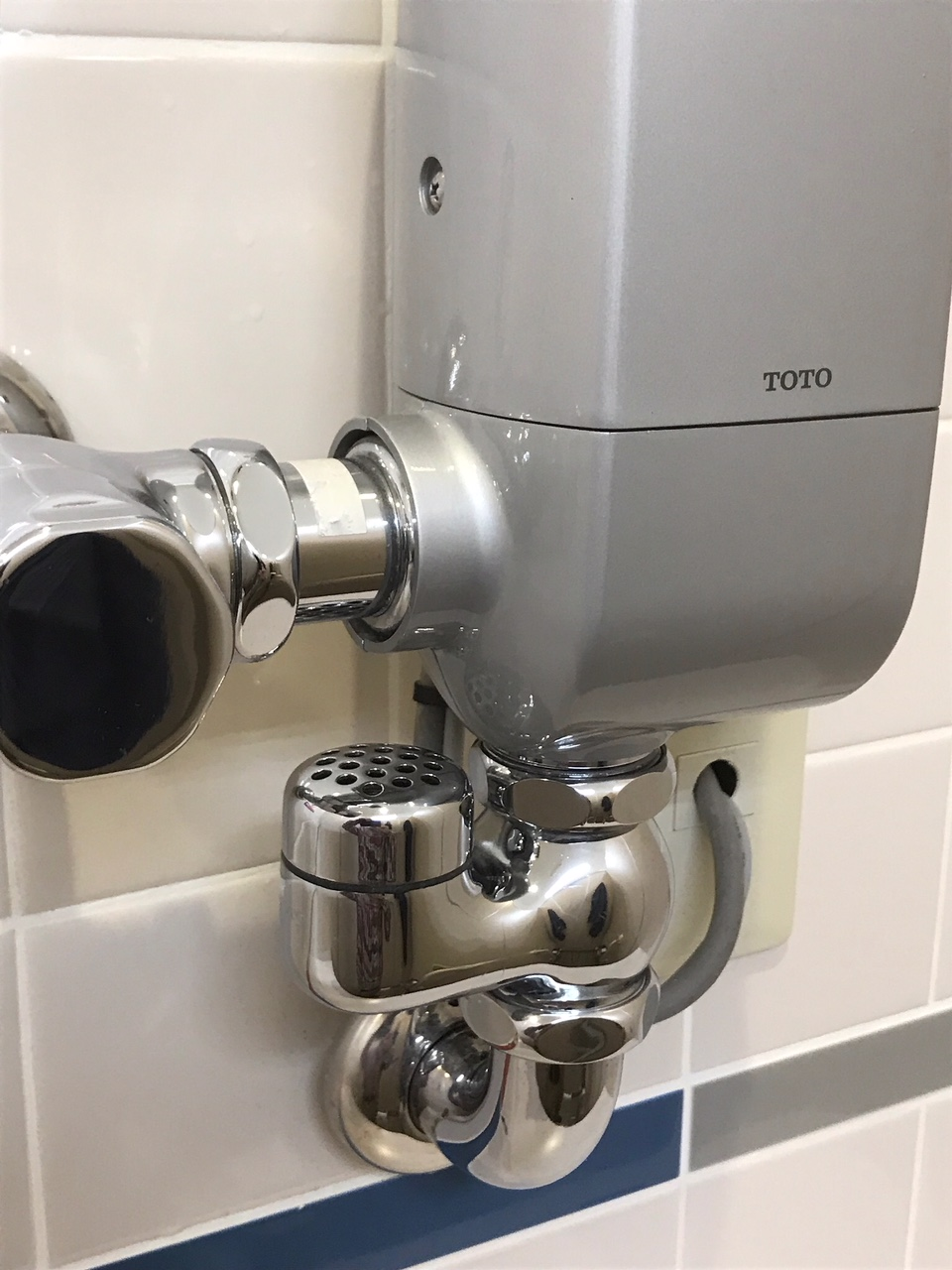 TOTO TV1-VB--1